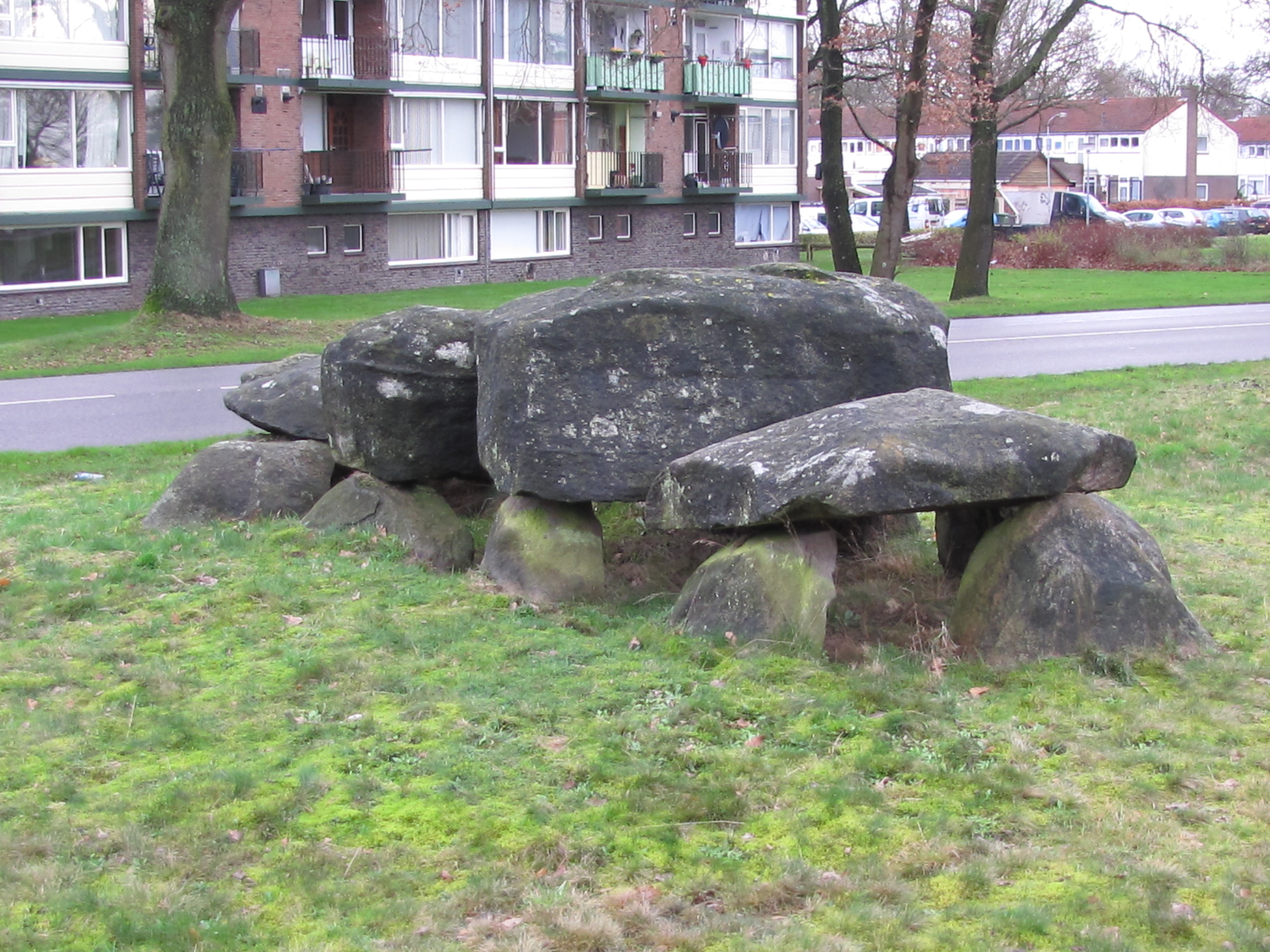 Hunebed D41 vlakbij de Odoornerweg aan de noordkant van Emmen